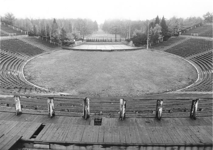 Wuhlheide zu DDR-Zeiten